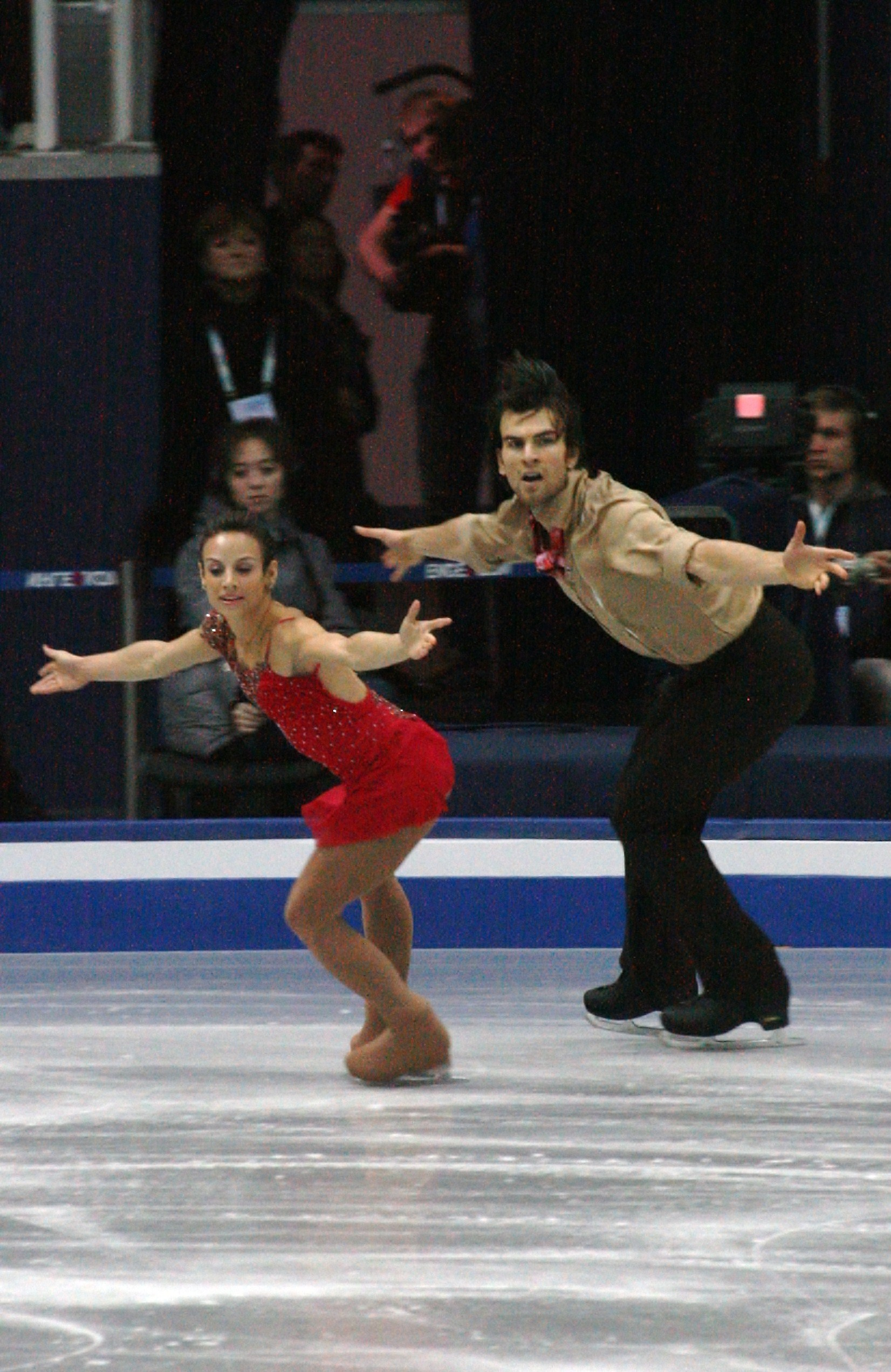 Мэган Дюамель и Эрик Рэдфорд (Канада) на финале Гран-при 2012-2013. Короткая программа.